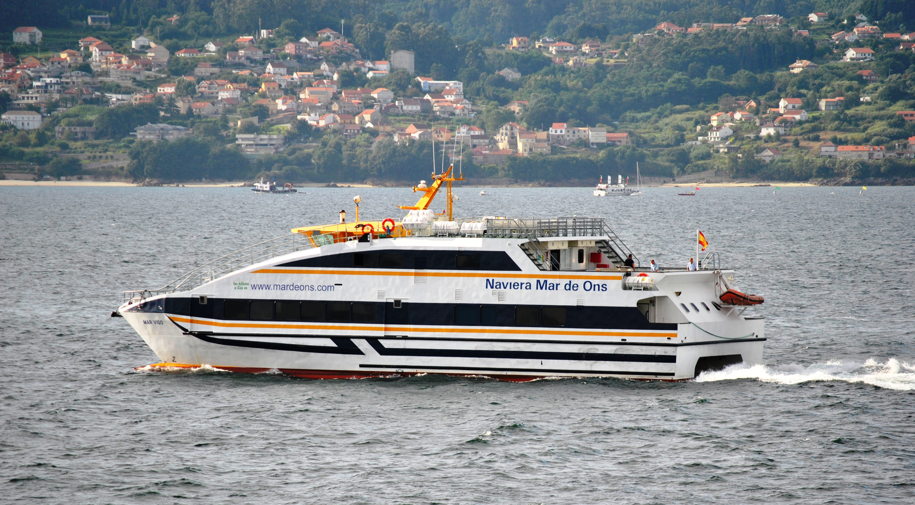 Vexa o título e as categorías.